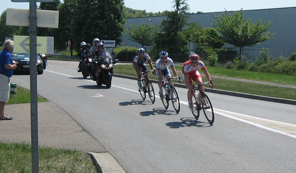 Circuit de Lorraine - 4. Etappe in Boulay-Moselle (km 104,5). Die drei zu diesem Zeitpunkt führenden Fahrer Gianluca Maggiore, Jonathan Hivert und Romain Zingle (v.l.n.r.).